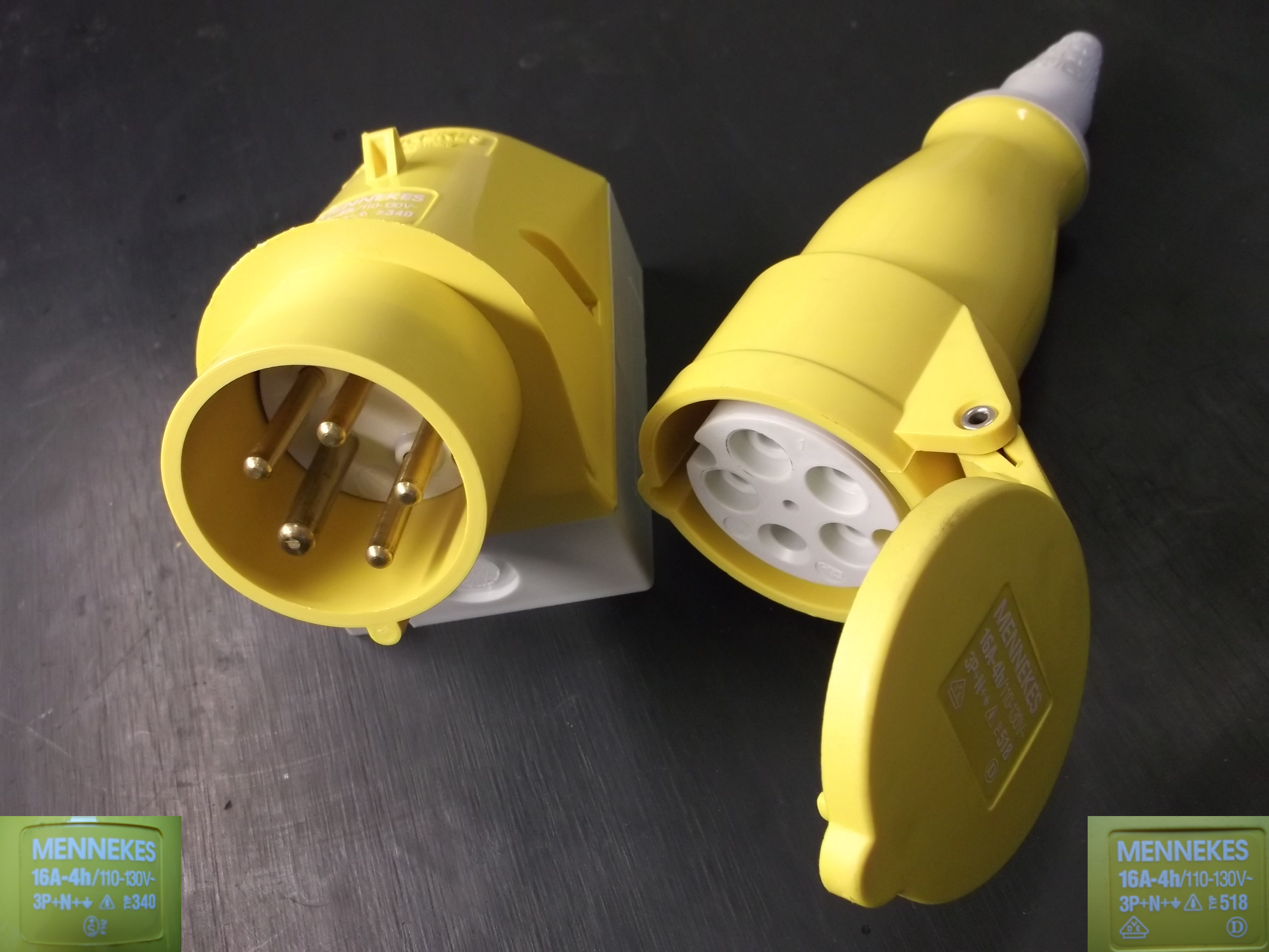 CEE Steckverbinder 16A 4h 110-130V IP44 - Anbaustecker und Kupplung .